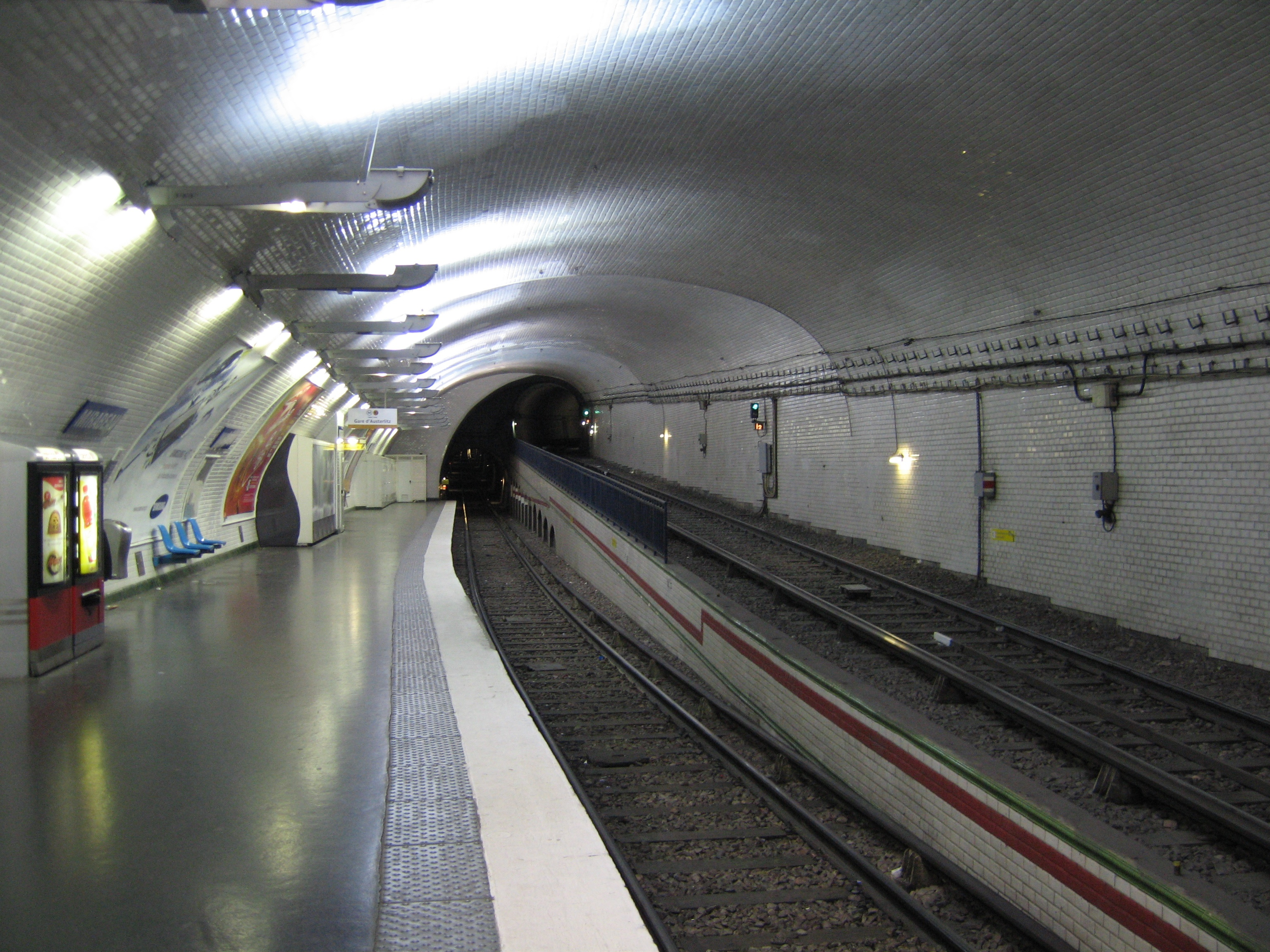 Configuration particulière de la demi-station Mirabeau, ligne 10.